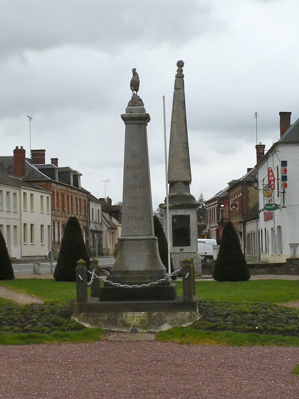 monument aux mort de Saint-Germer-de-Fly